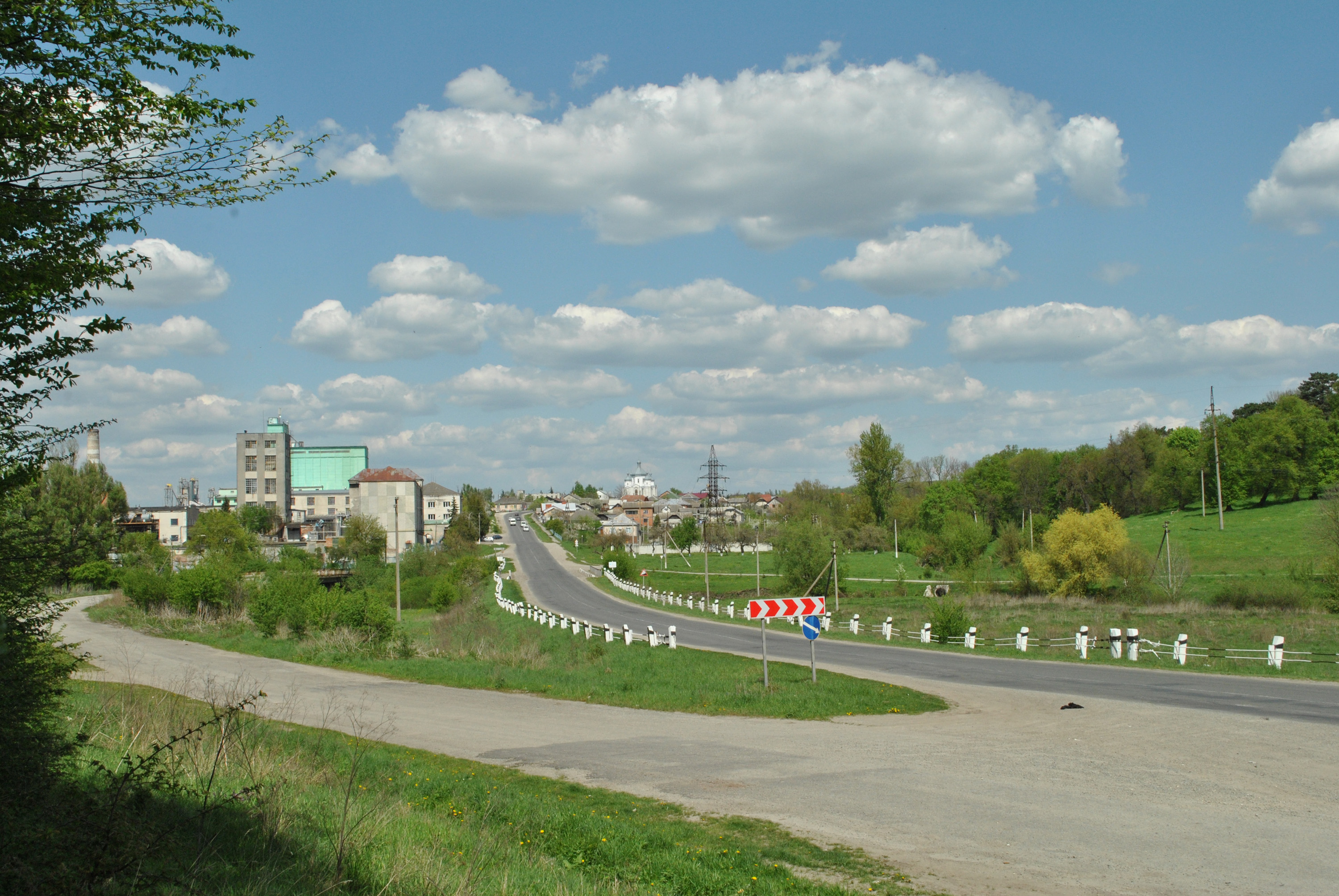 Вигляд Мишковичів Тернопільського району з півдня. Автошлях Т 2020.